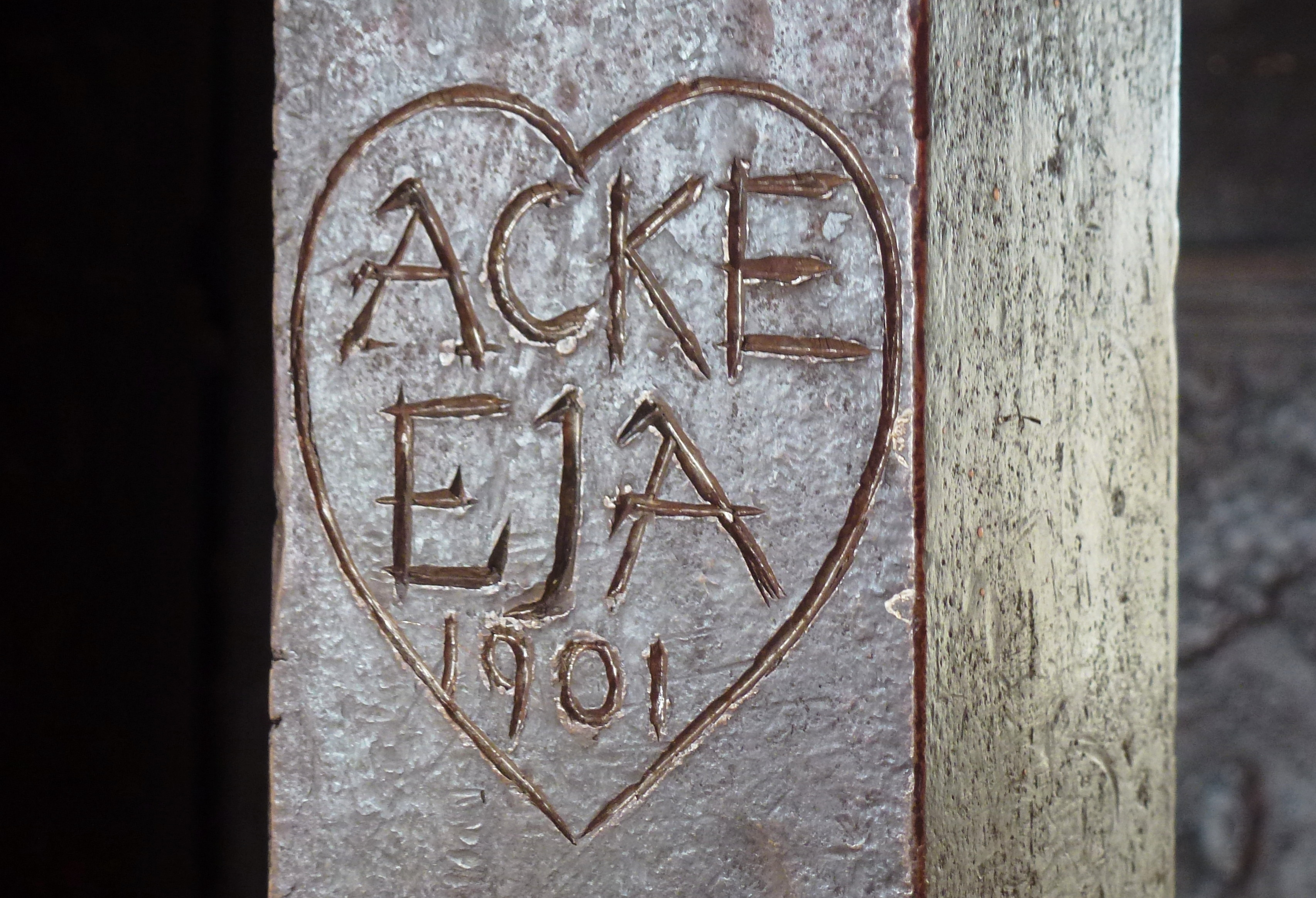 Ristning ”Acke Eja 1901” inramat av ett hjärta på smidesstolpen i öppna spisen